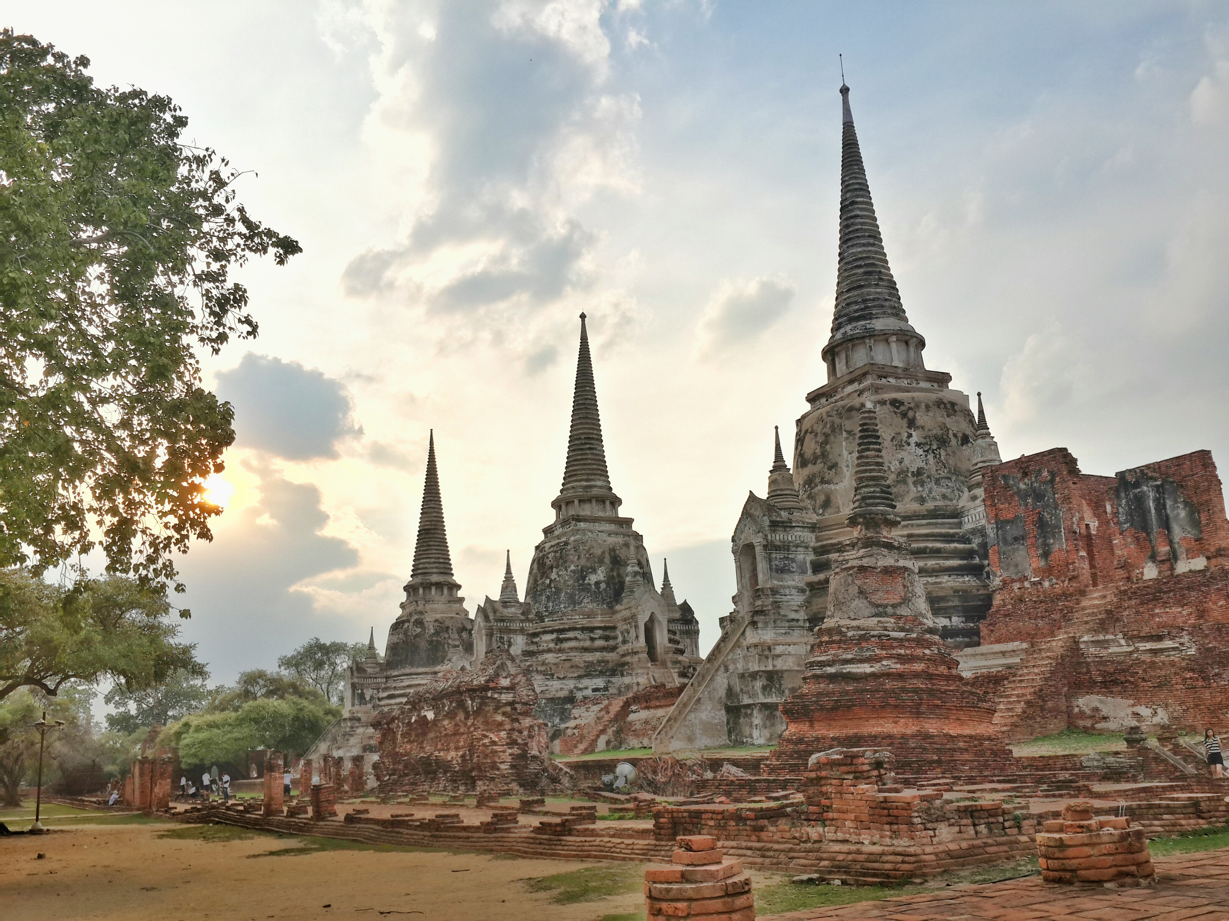 วัดพระศรีสรรเพชญ์